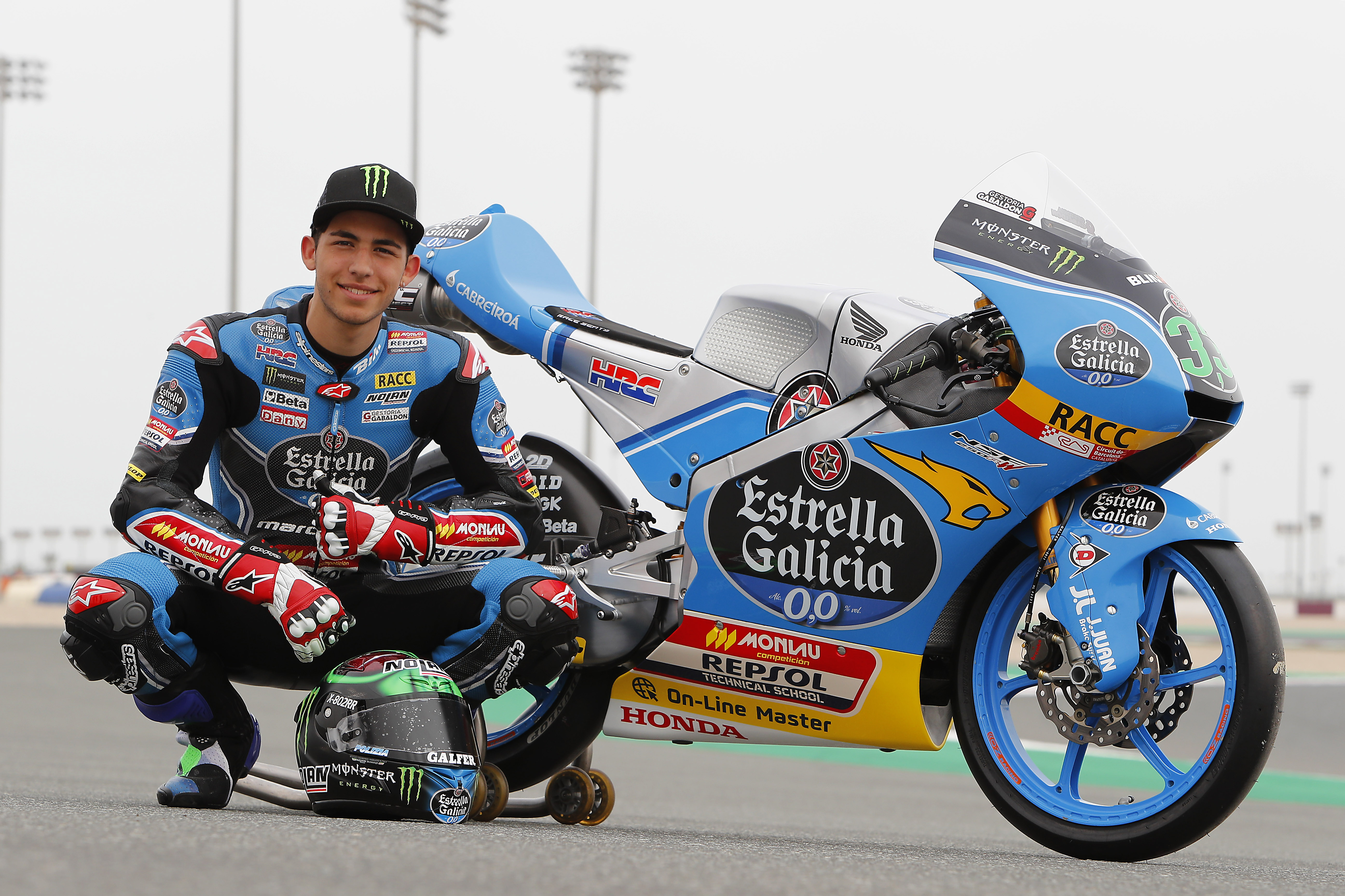 Ene Bastianini. Qatar GP 2017